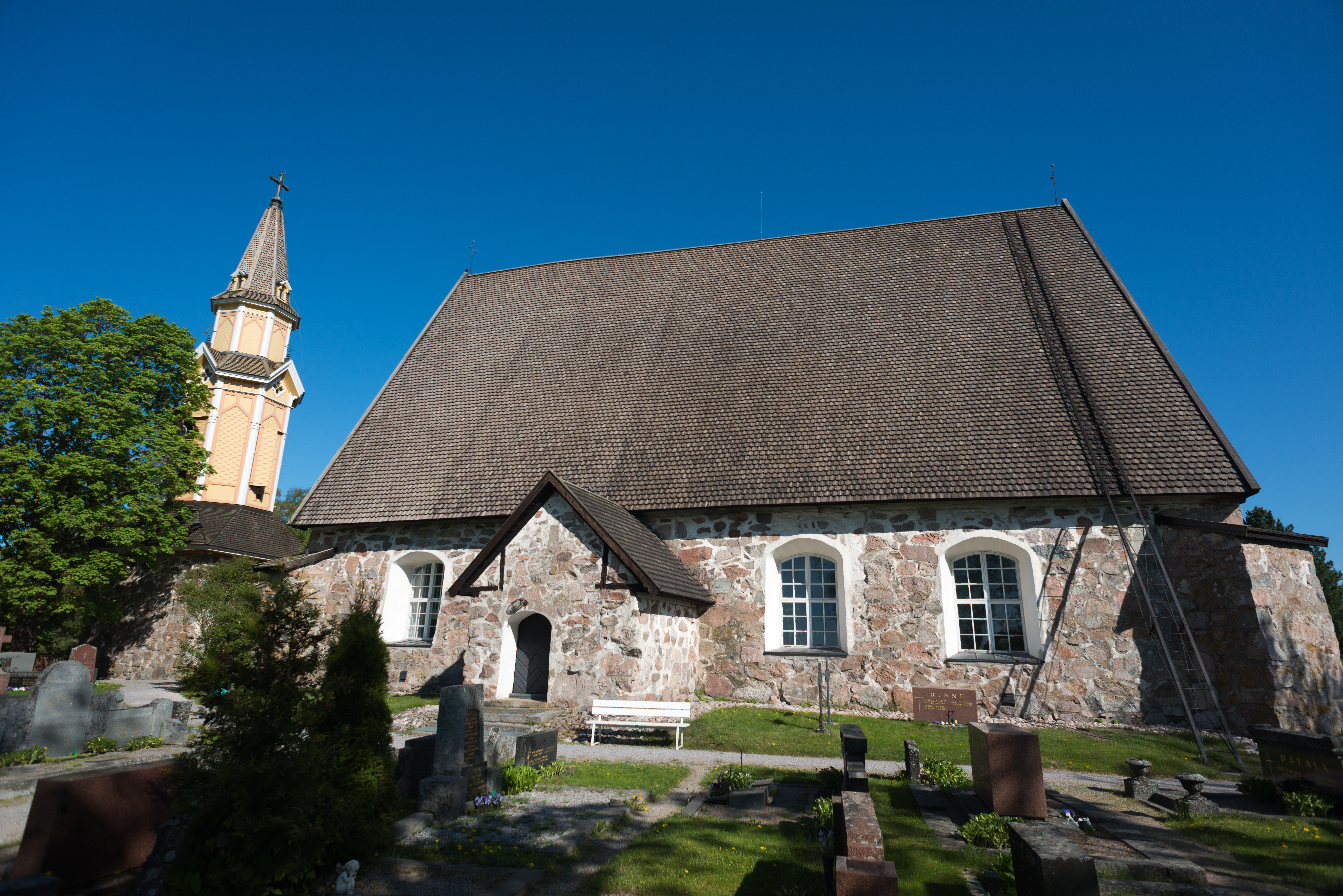 Perttelin kirkko